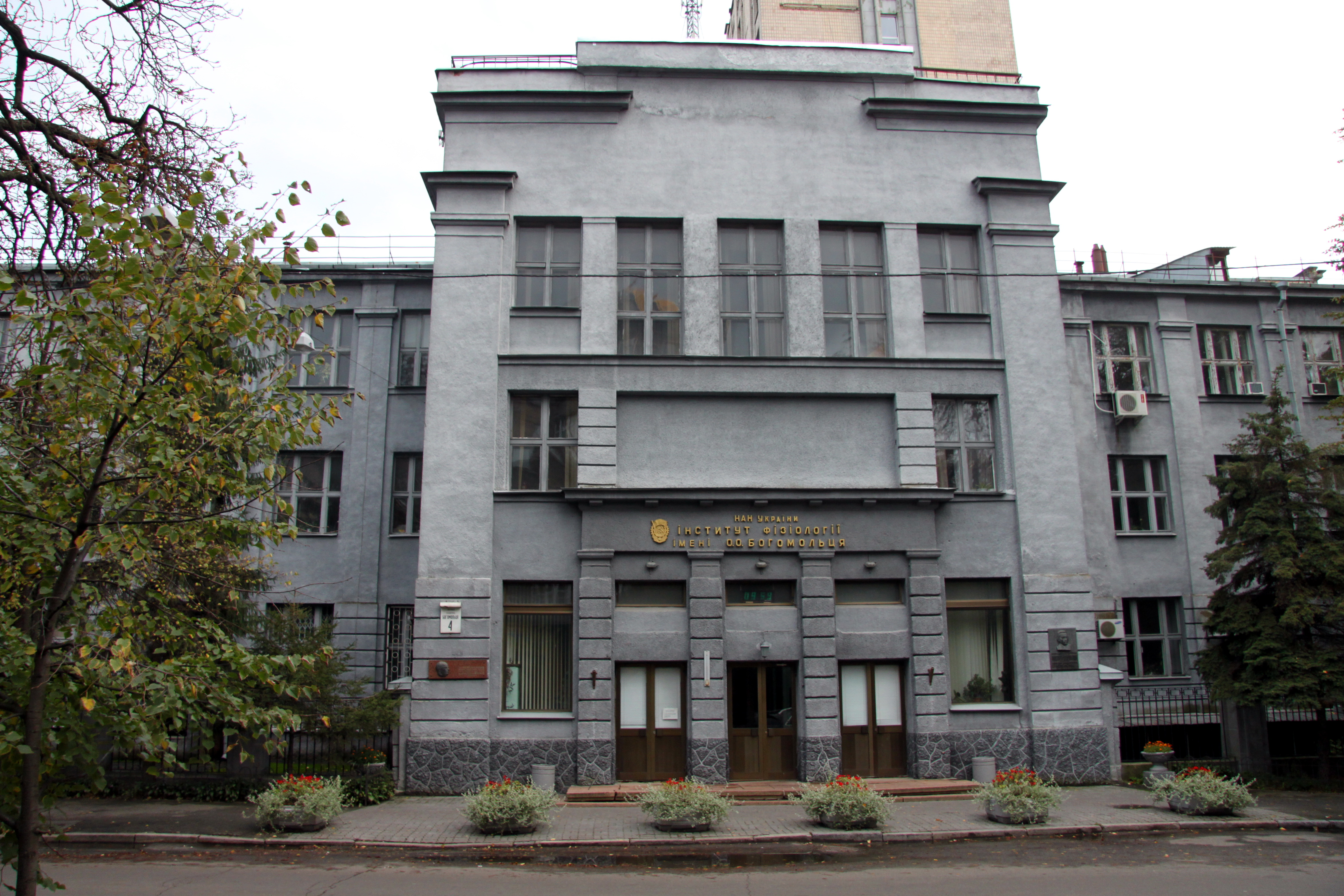 Будинок Інституту фізіології НАН України, в якому у 1936—1940 рр. працював Богомолець О. О., фізіолог, академік; у 1953—1979 рр. — Макарченко О. Ф., вчений-біолог, академік та інші відомі науковці, Київ, Богомольця Академіка вул., 4